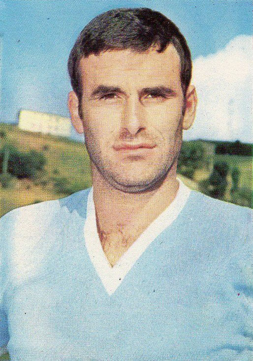 Il calciatore italiano Sergio Petrelli alla Lazio nella stagione 1973-74.